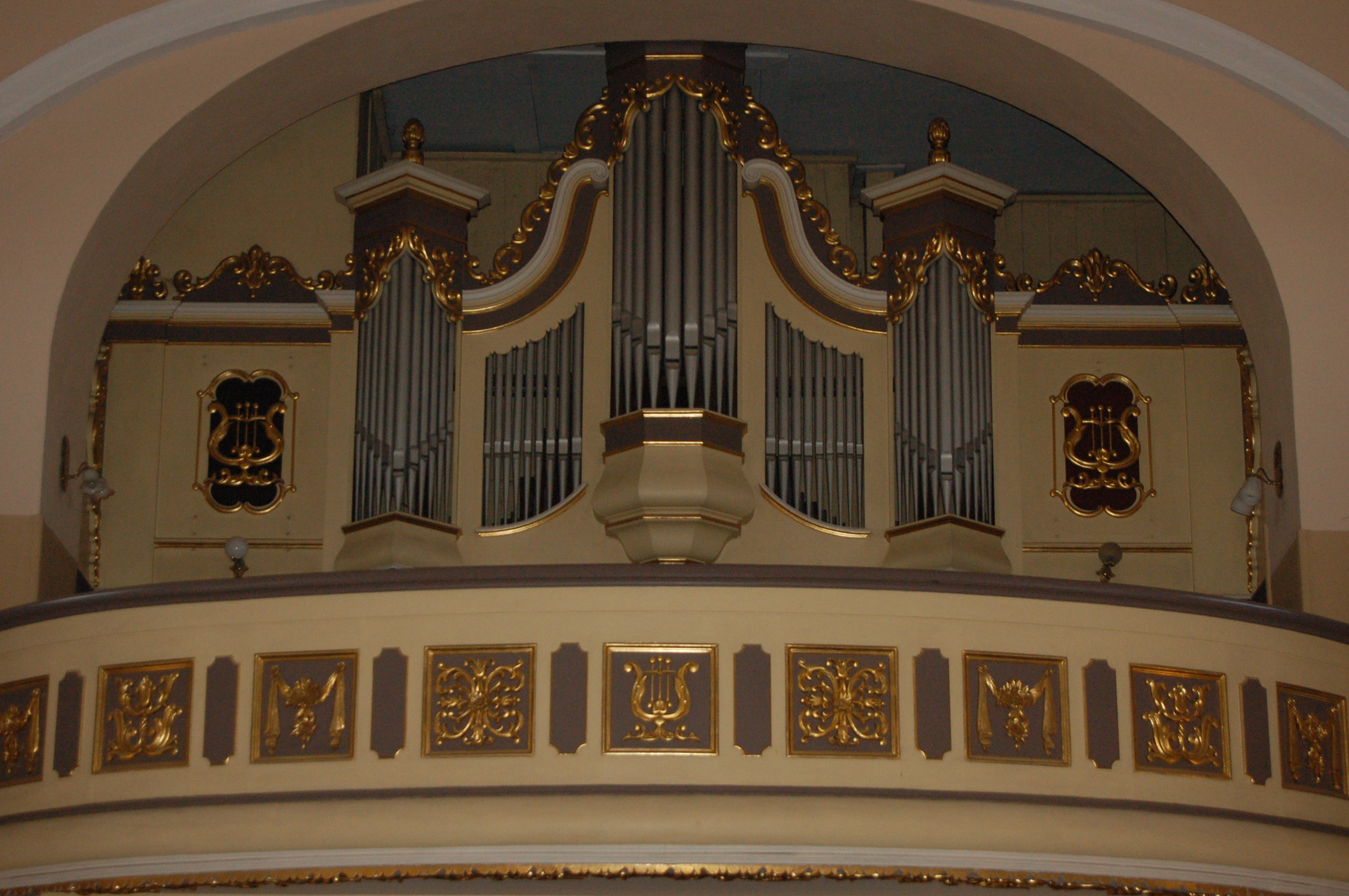 Chór i organy w kościele św. Krzyża w Rumi